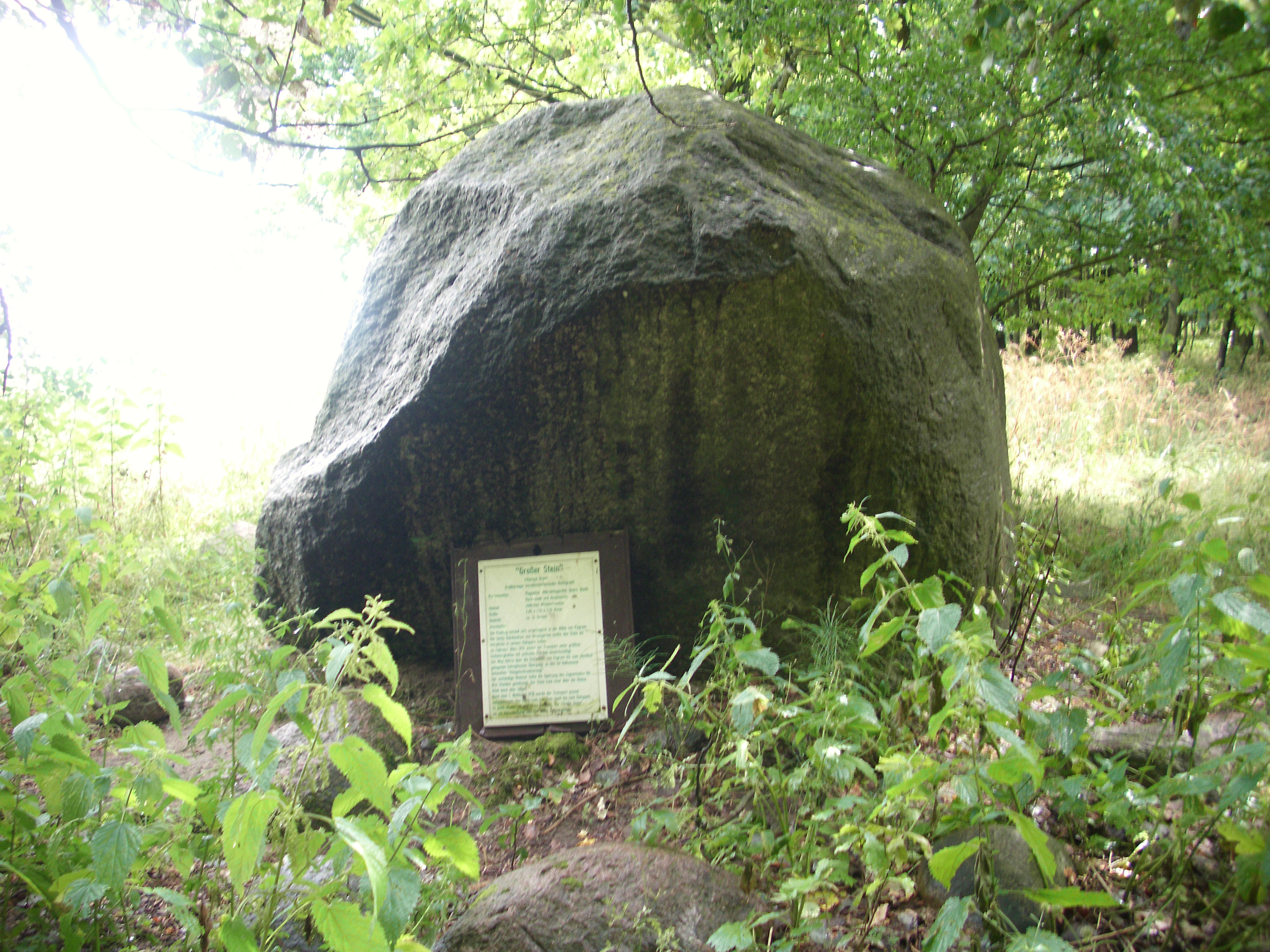 Großer Stein, Rosengarten bei Frankfurt (Oder), 2,85 x 2,10 x 1,70 Meter, 14 t, Filipstad-Granit, Herkunft südliches Mittelschweden